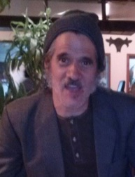 El pintor ecuatoriano Luigi Stornaiolo